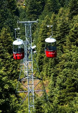 Sarıalan Çobankaya Telesiyeji